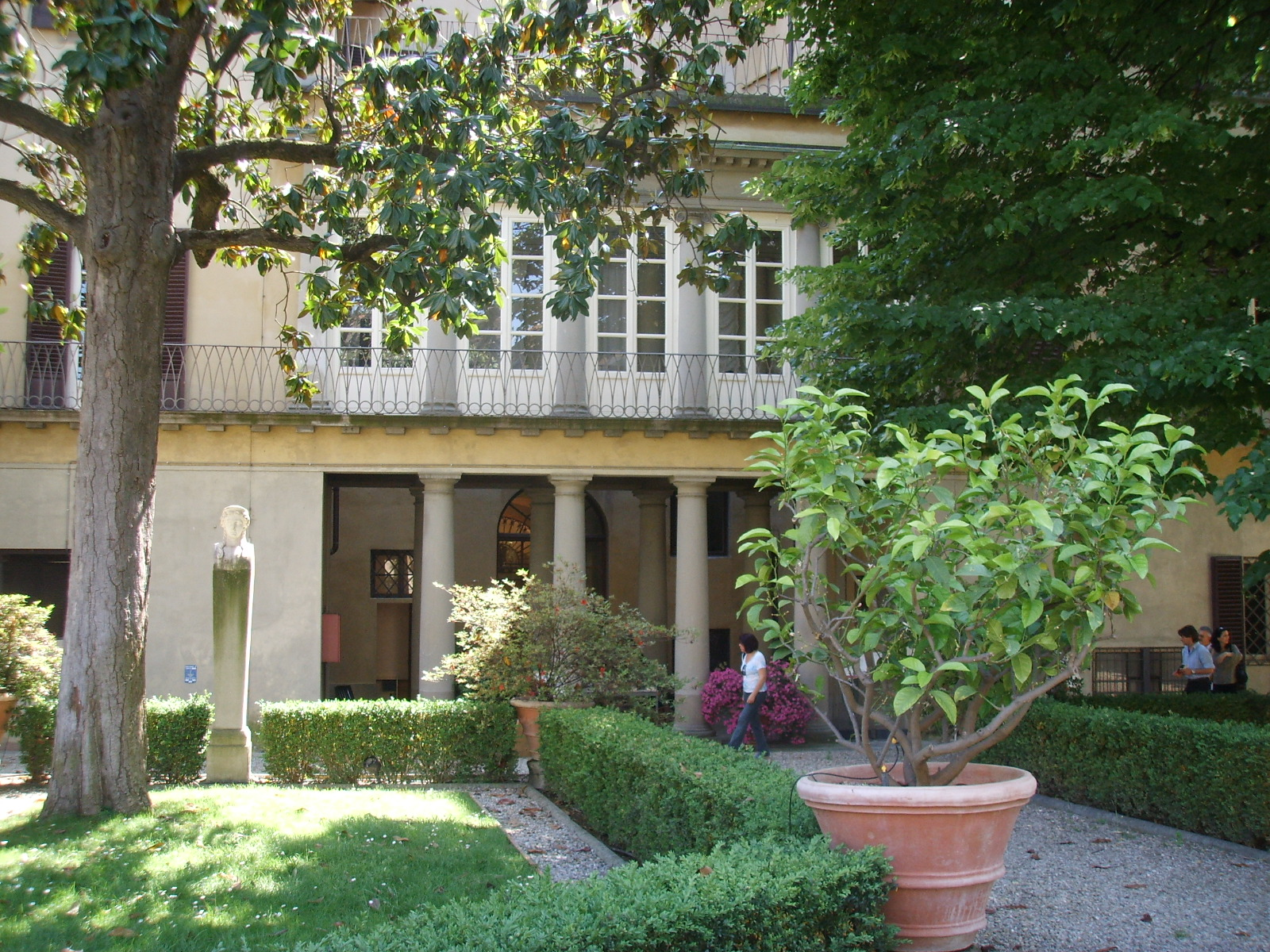 see description